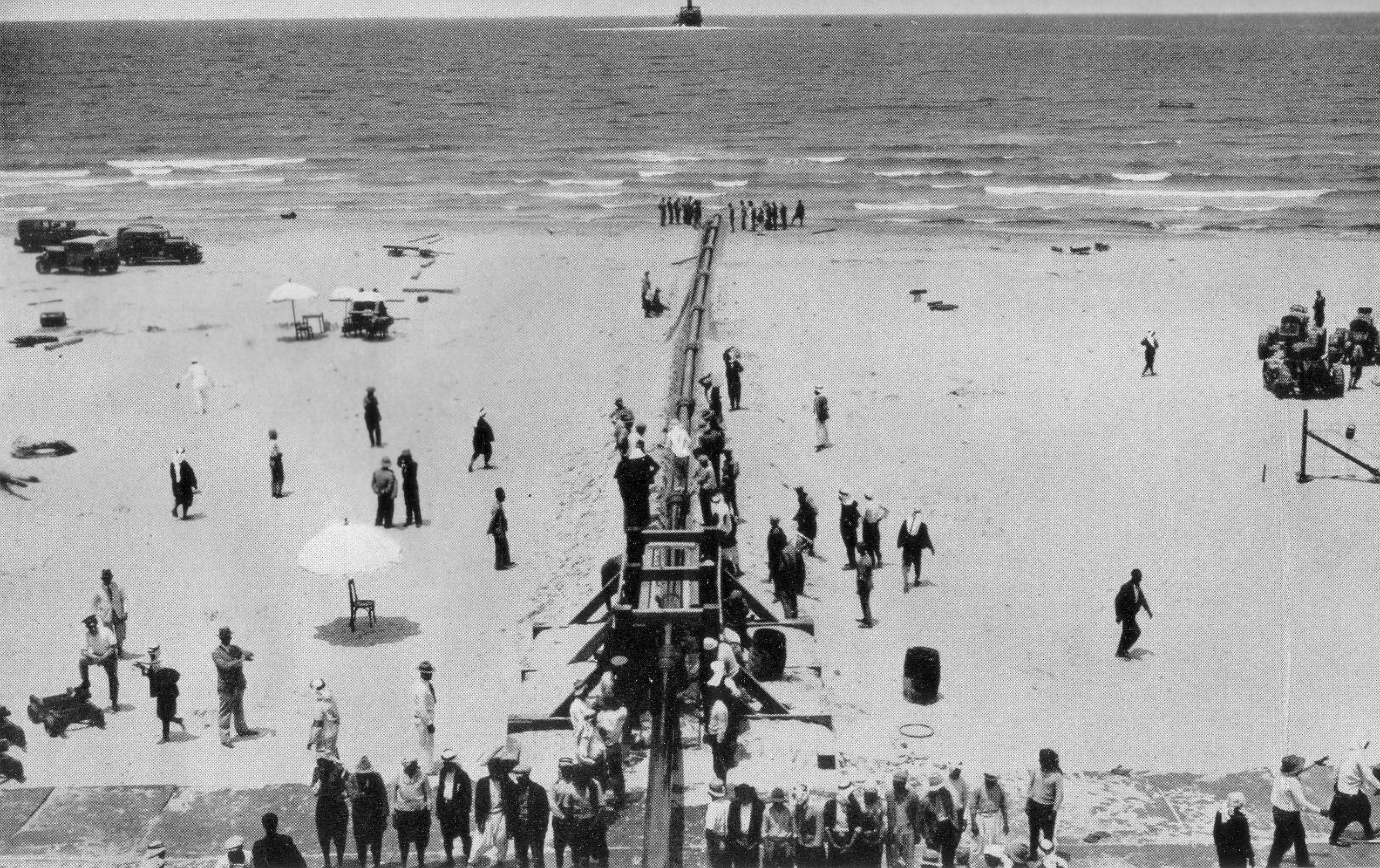 צינור הנפט כירכוכ-חיפה, קצה הקו בחוף חיפה, 1938